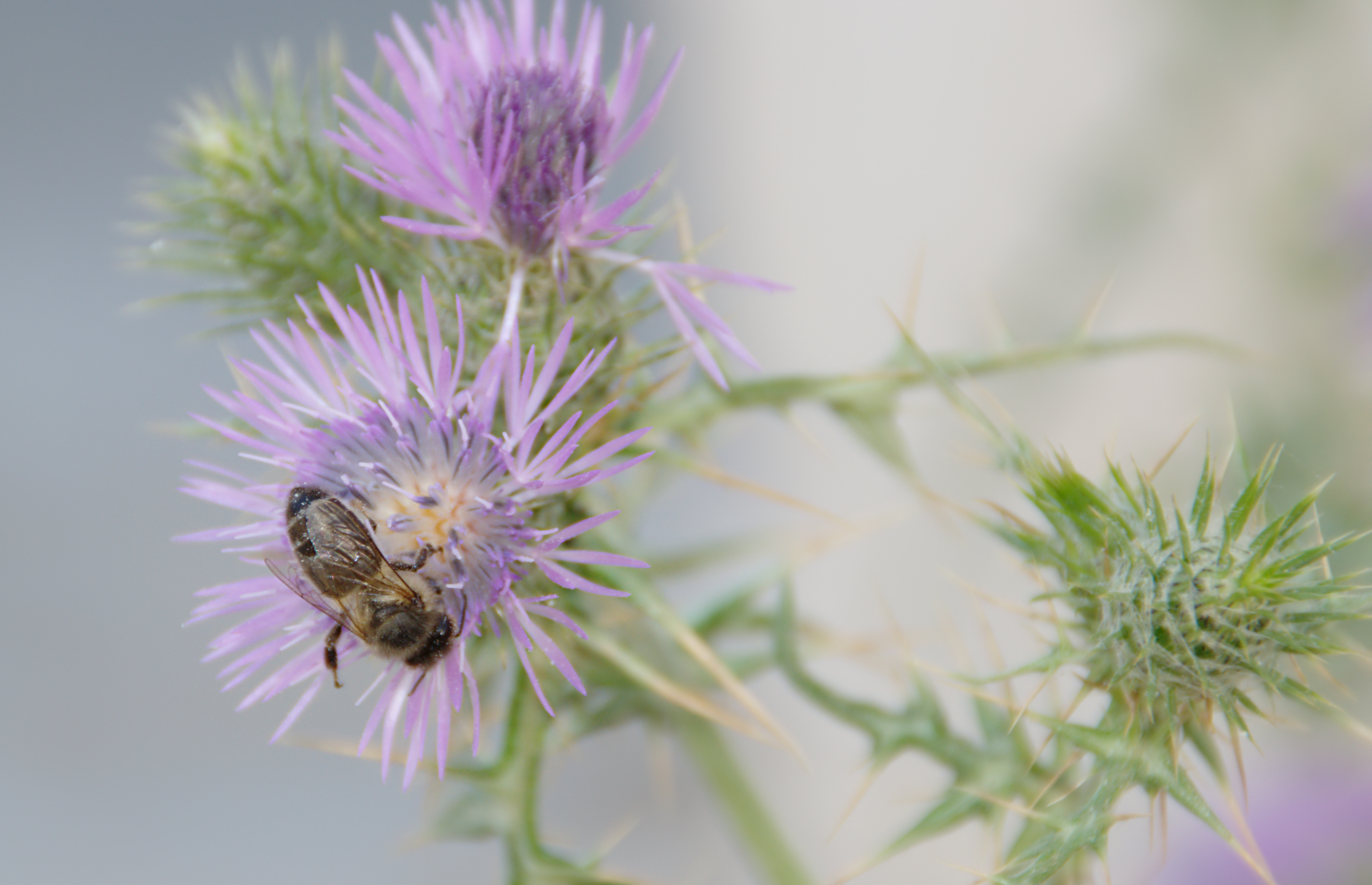 Abeille maghrébine (Tellienne)